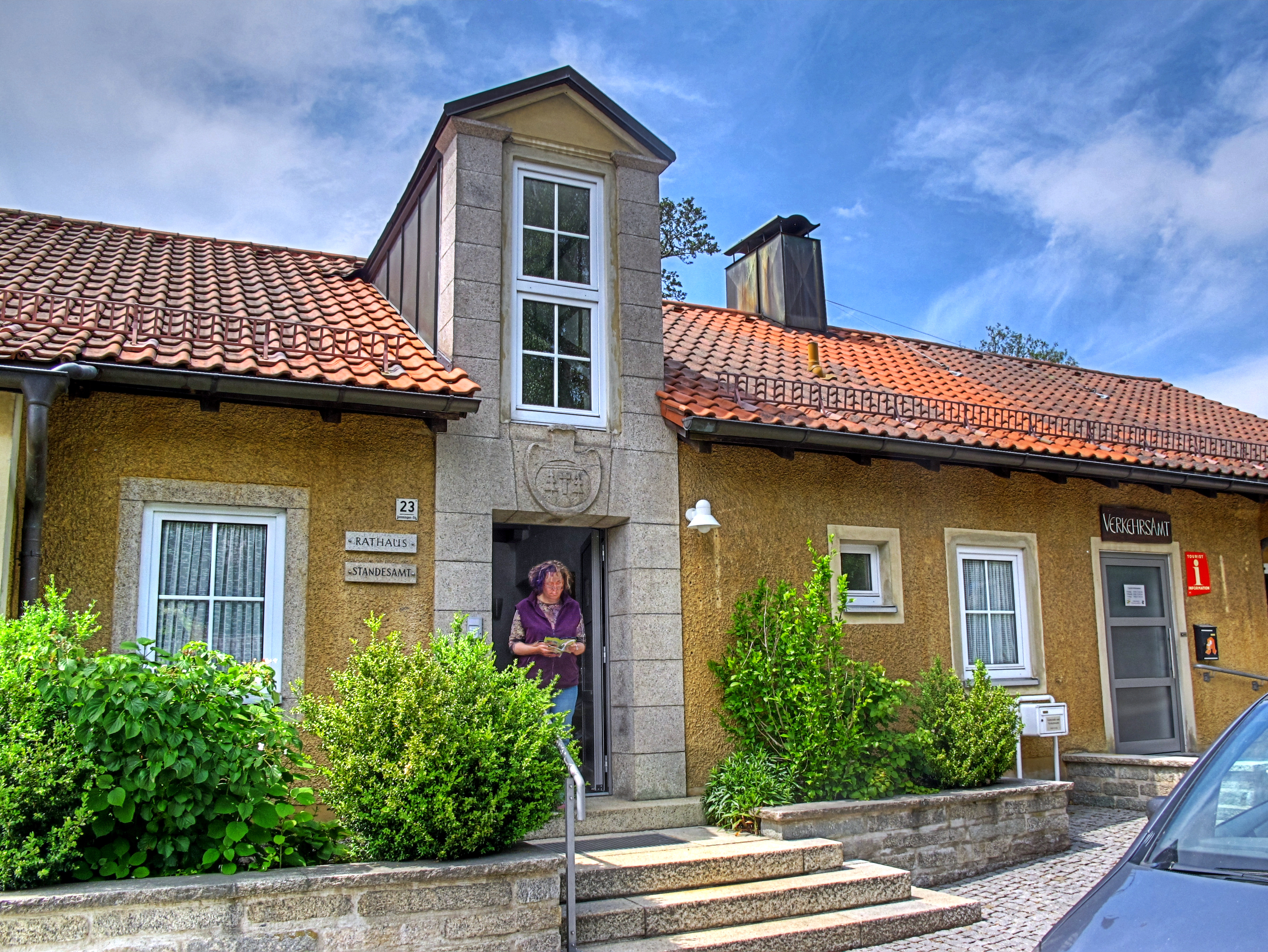 Deutschland, Bayern, Oberpfalz, Landkreis Tirschenreuth, Gemeinde Friedenfels, Rathaus